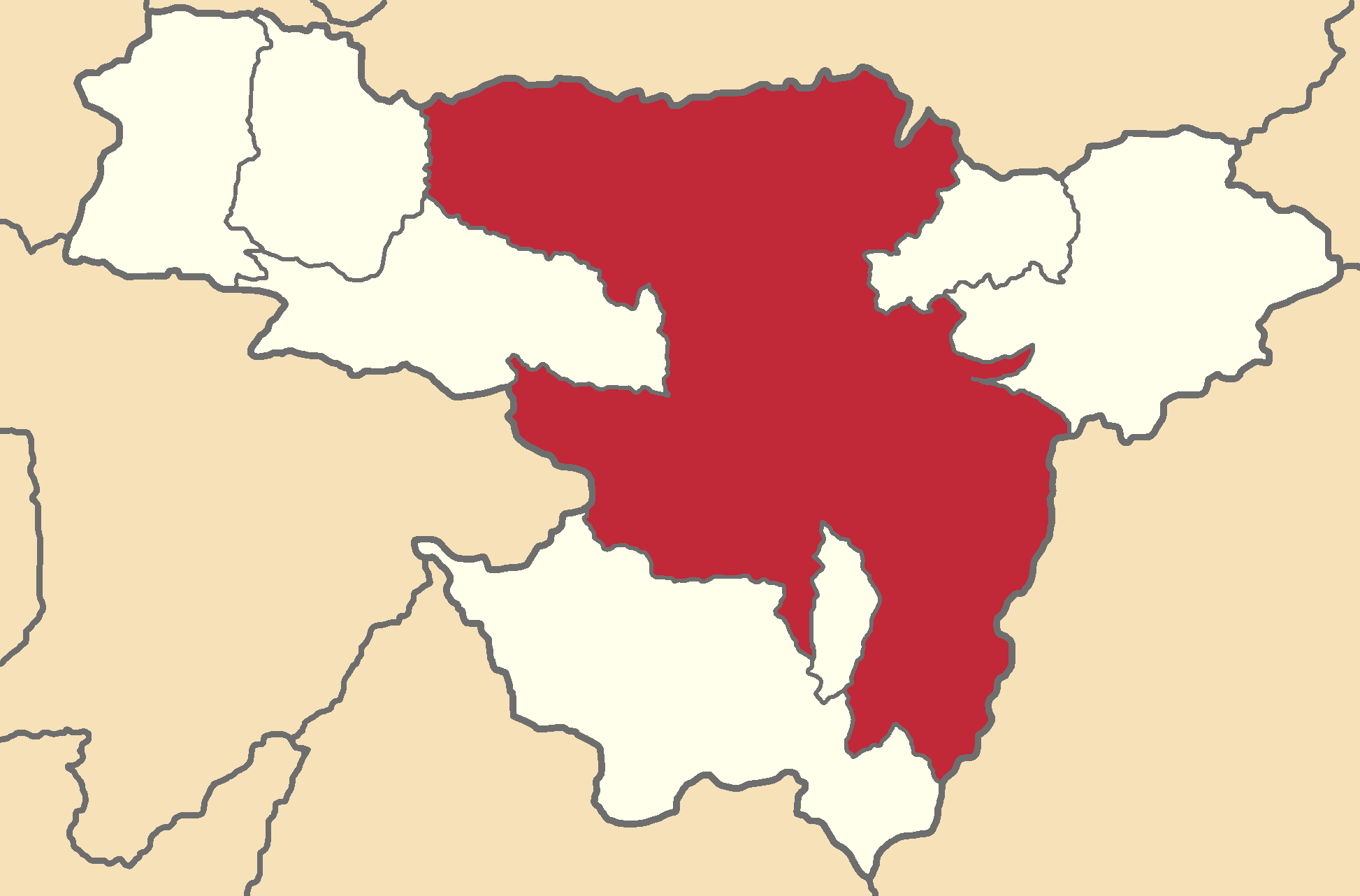 Mapa localizador del cantón en Pichincha, Ecuador